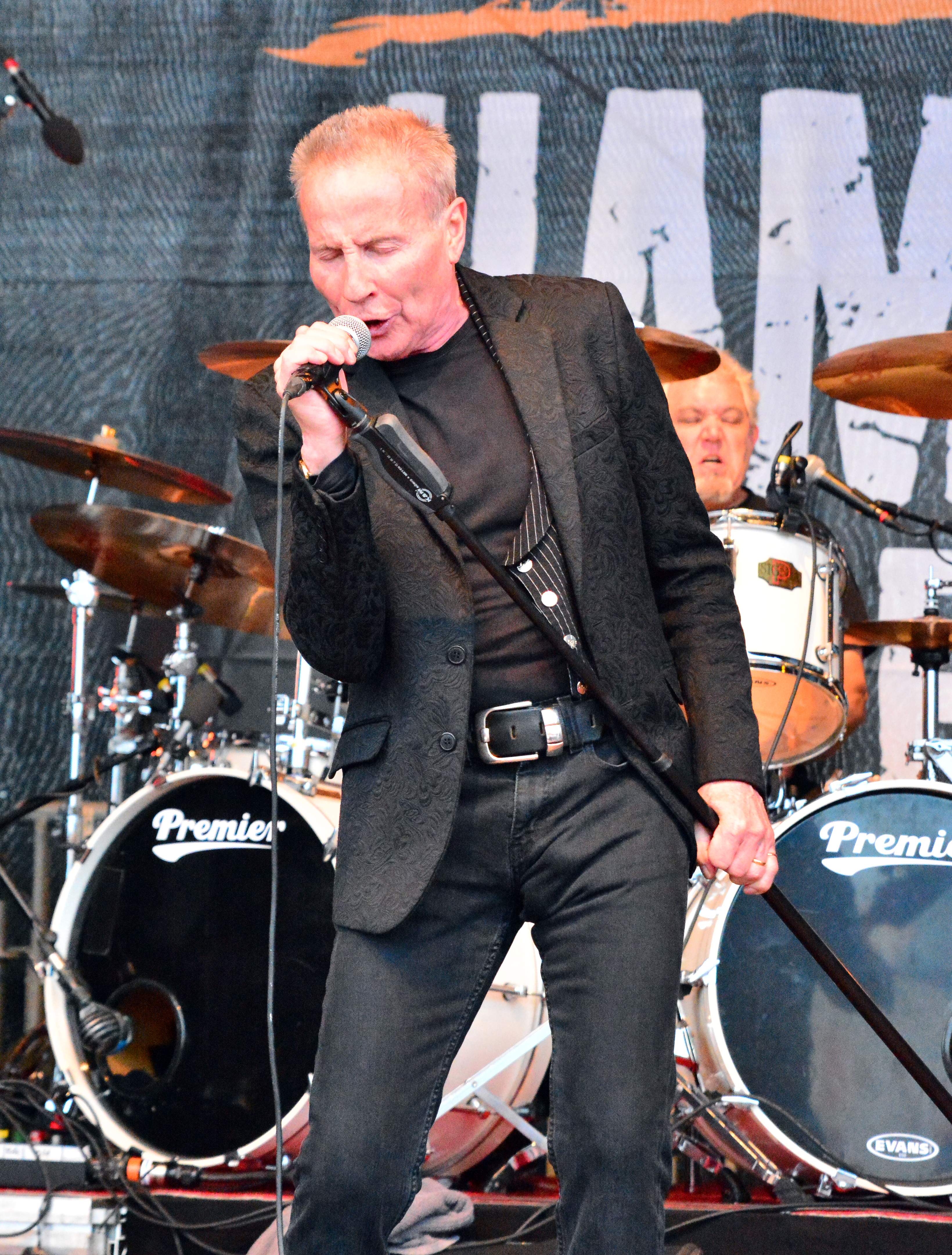 Phil Mogg von UFO bei den „Hamburg Harley Days“